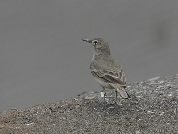 Coastal Miner in Peru